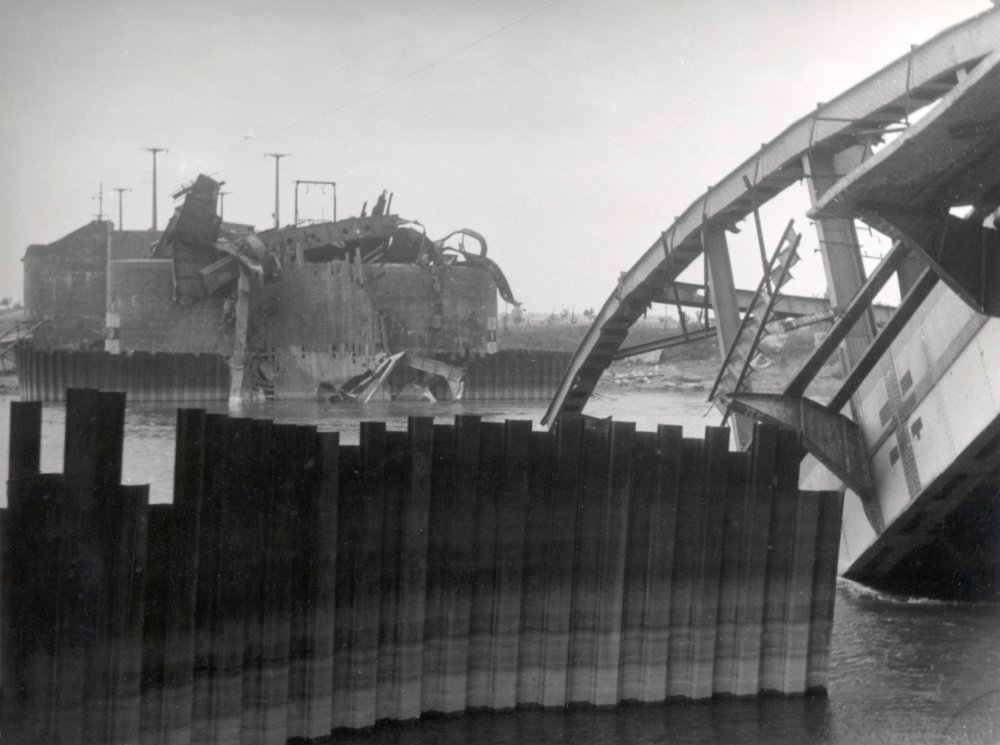 Brug kapot geschoten tijdens Slag om Arnhem, september 1944. Collectie: Spaarnestad Photo Fotograaf: J.Th.A. v.d. Wal / Spaarnestad Datum: 09-1944 Fotonummer SFA003012906 Code: 1700-1 Voor meer informatie en foto's uit deze en andere collecties bezoek